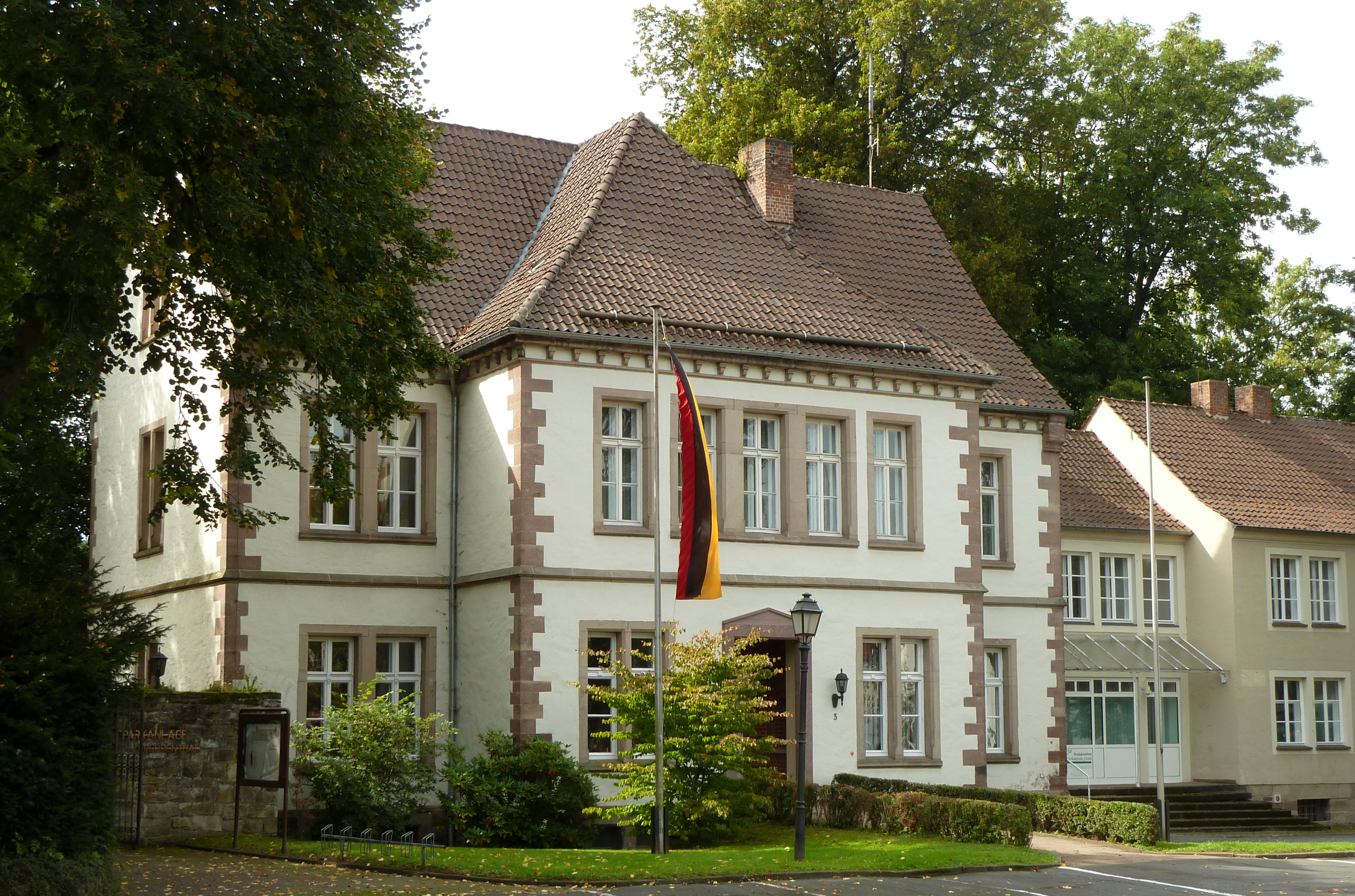 Ehemaliges Amtsgericht in Uslar, Niedersachsen. Erbaut 1888/89 auf dem ehemaligen Ostflügel des Schlosses Freudenthal, Architekt: Bauinspektor Köppen